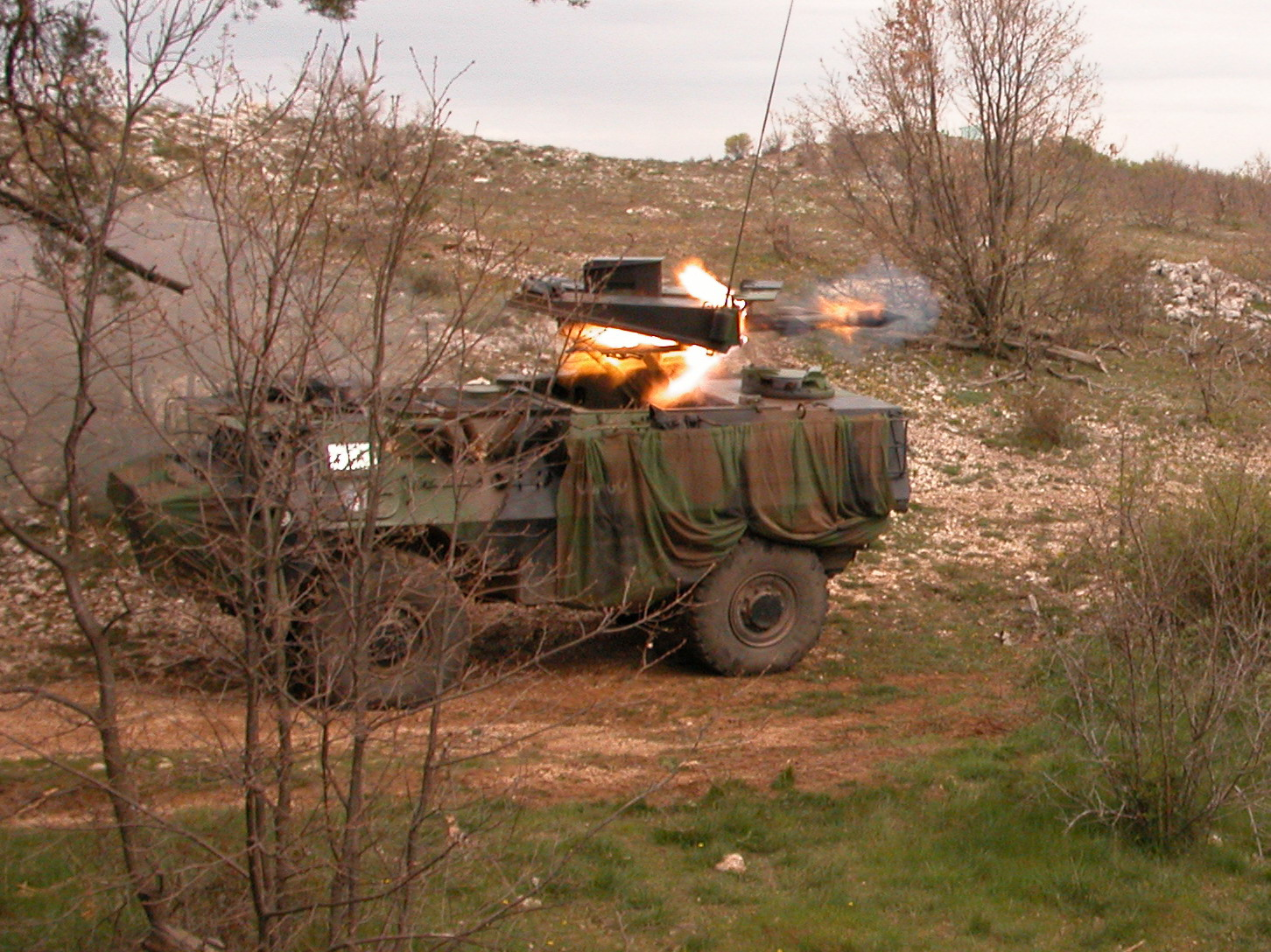 VAB HOT MEPHISTO (Module Elévateur Panoramique HOT Installé Sur Tourelle Orientable) du 2e Régiment étranger d'infanterie (France) tirant un missile anti-char HOT.